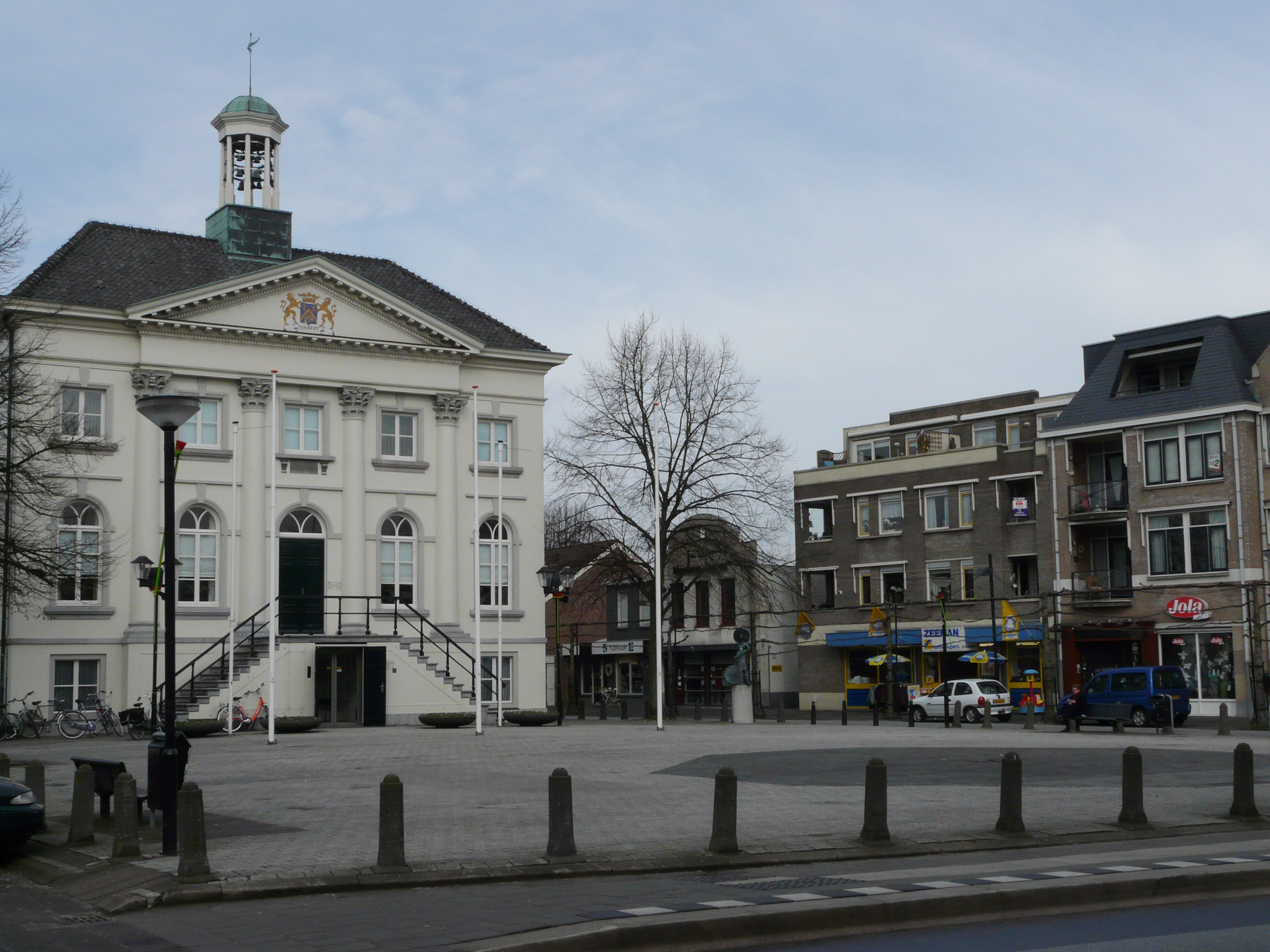 Gemeentehuis in Zundert